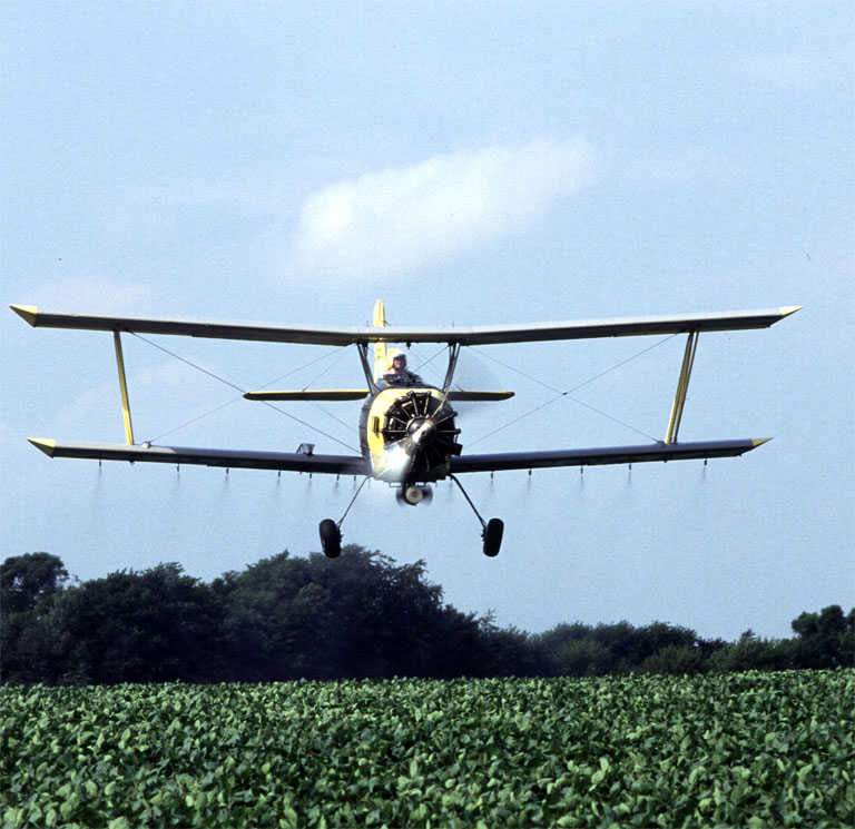 Grumman G-164 Ag-Cat. Public Domain, U.S. Department o Agriculture — Agricultural Research Service